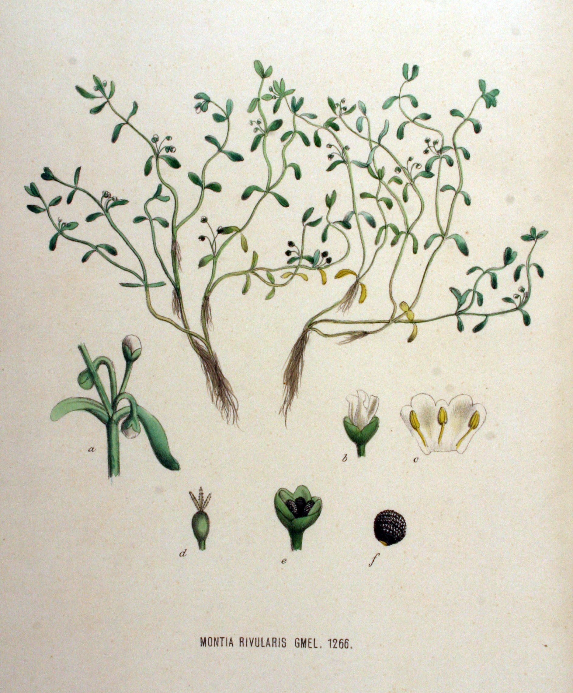 Montia fontana L. subsp. amporitana Sennen (Syn. Montia rivularis auct. non C.C. Gmel.)